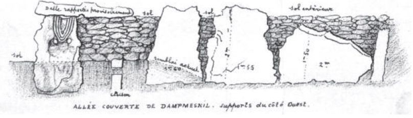 Supports côté ouest de l'allée couverte de Dampsmesnil dessinée par Coutil vers 1897